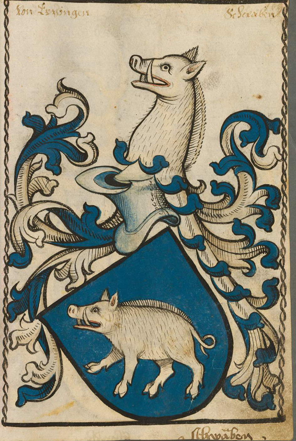 Scheibler'sches Wappenbuch, älterer Teil Wappen von Erzingen Seite 109